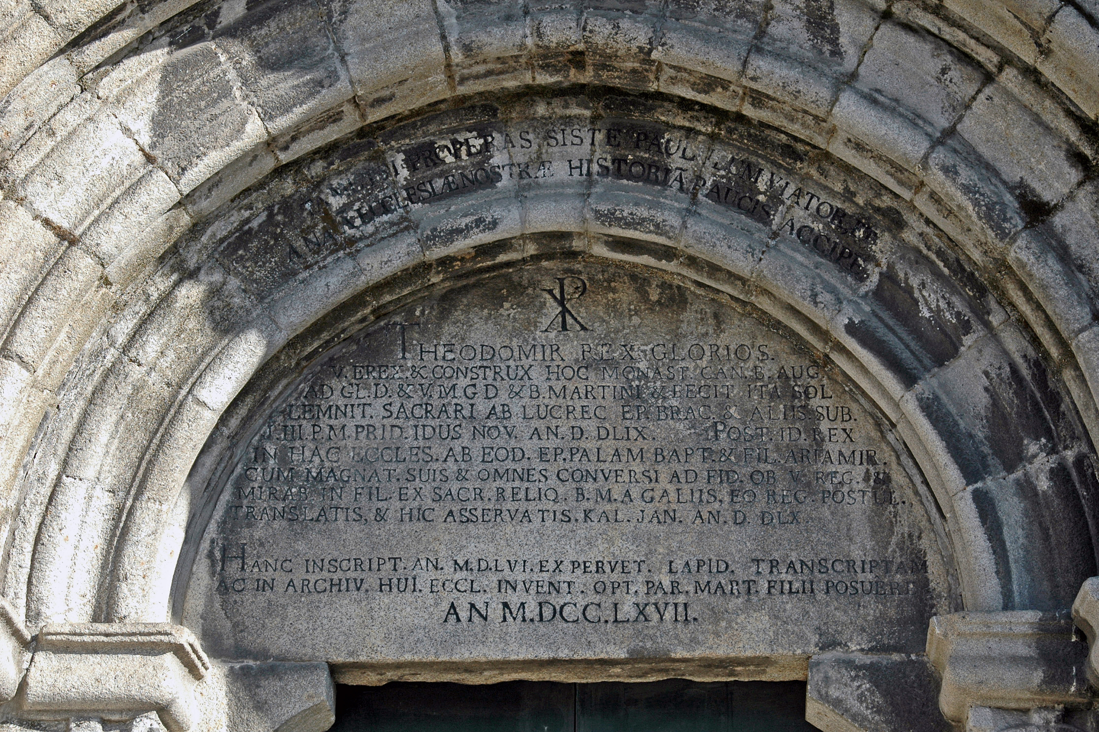 Igreja de São Martinho de Cedofeita ou Românica de Cedofeita - Detalhe